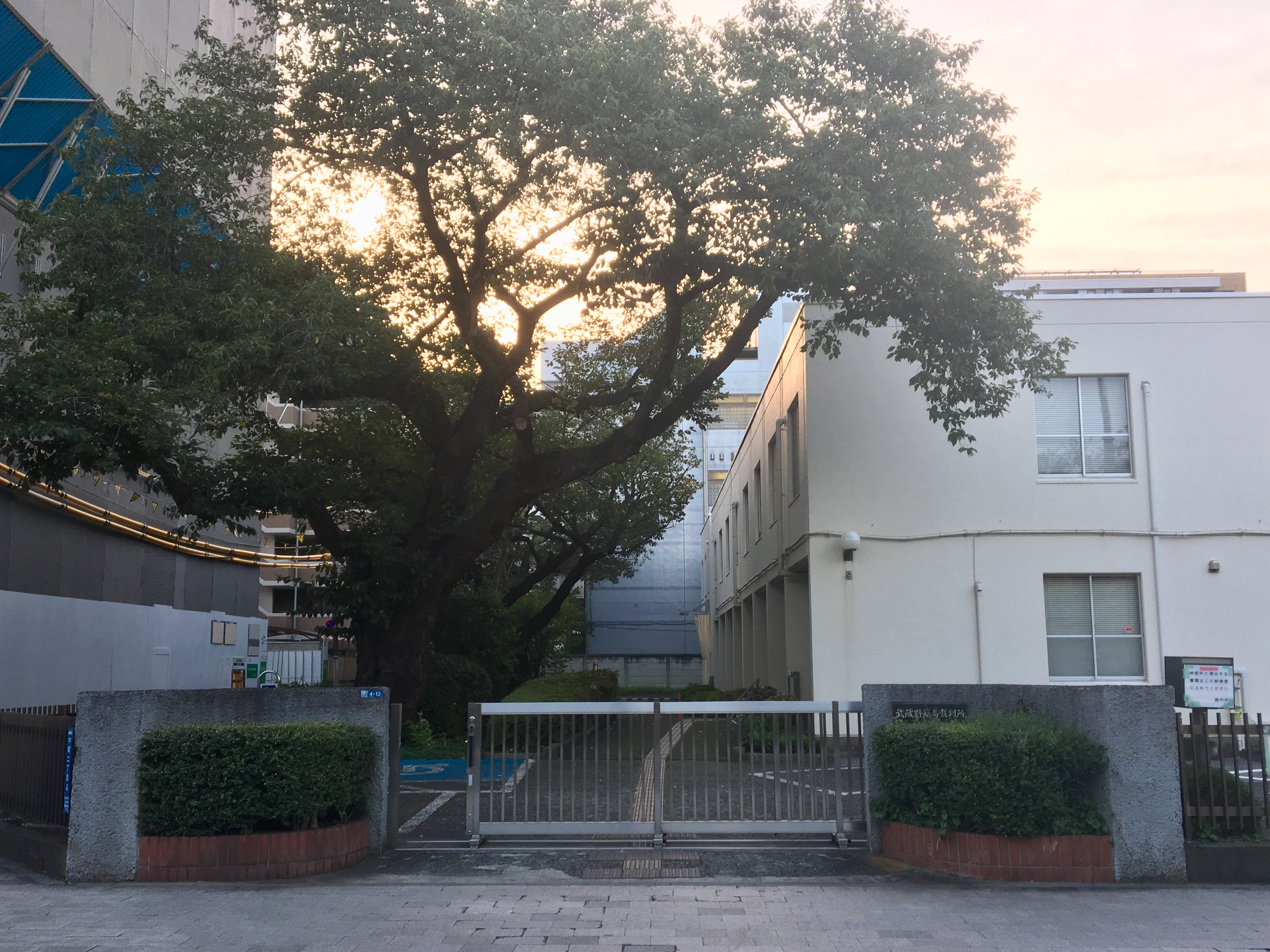 武蔵野簡易裁判所を正面から。自身による作品